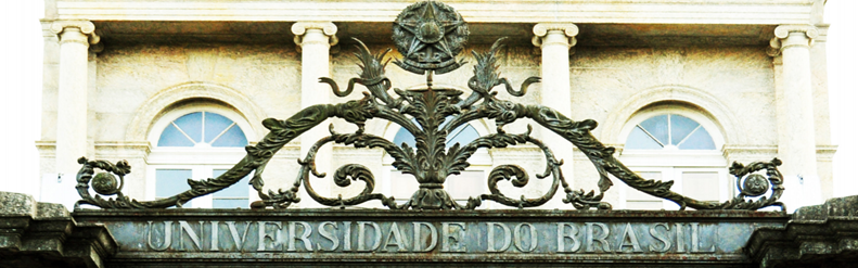 Portal do Palácio Universitário da UFRJ